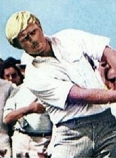 Jack Nicklaus, 'Campioni Dello Sport' 1973 - 1974, n°375